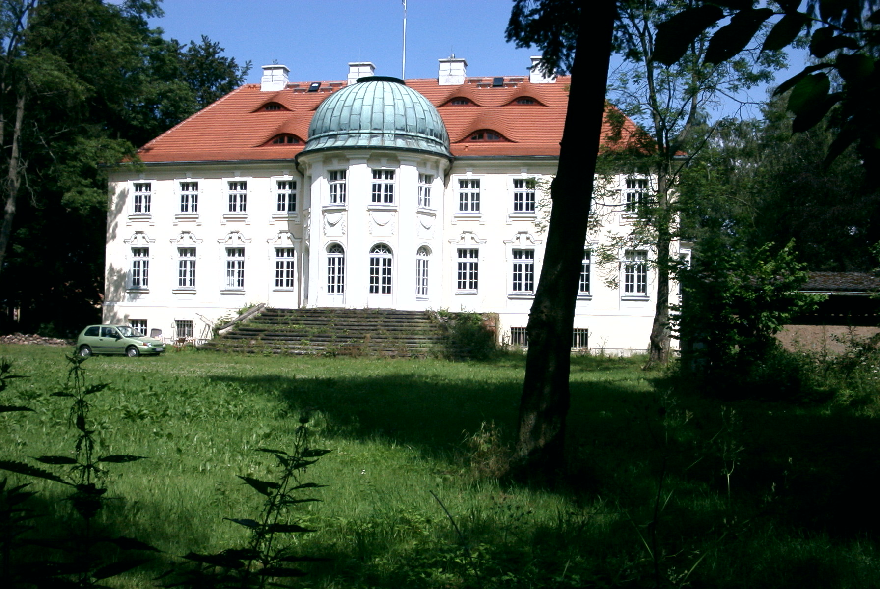 Schloss Bandelin - Parkseite